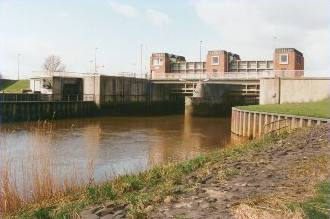 Ochtumsperrwerk